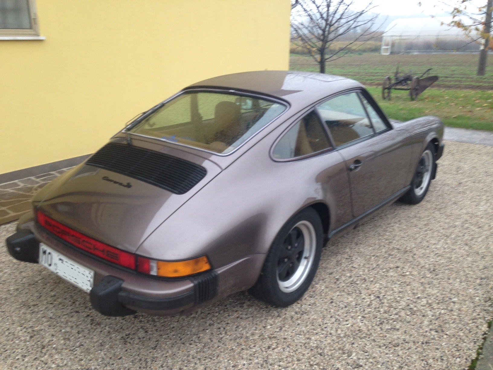 Porsche 911 Carrera 3.0